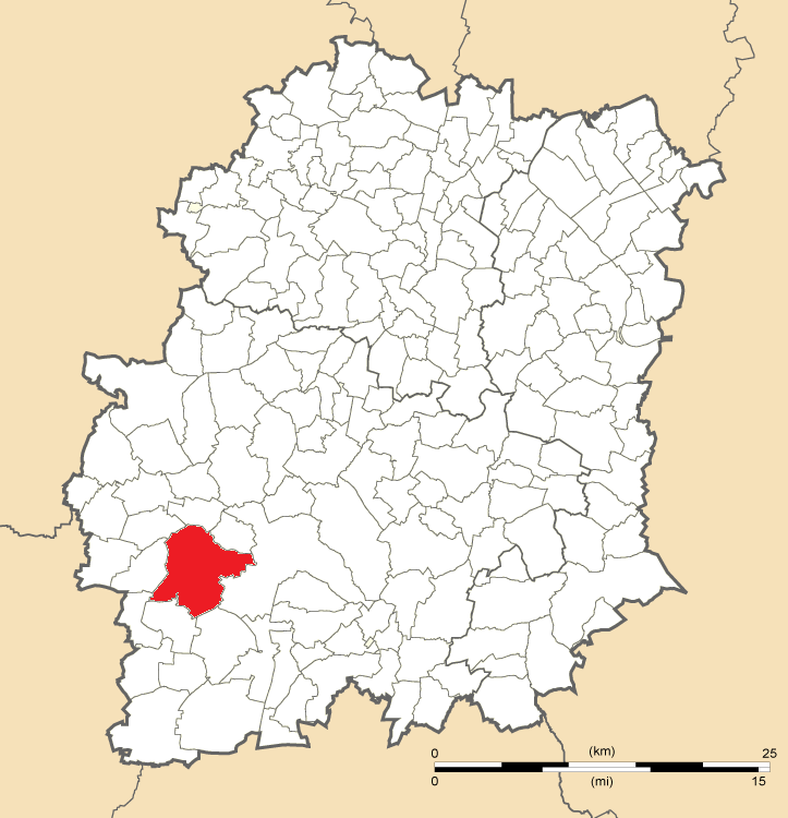 Carte de position de Chalo-Saint-Mars en Essonne (91)